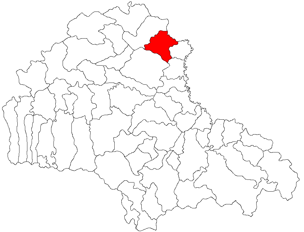 Categorie:Hărţi ale judeţului Braşov